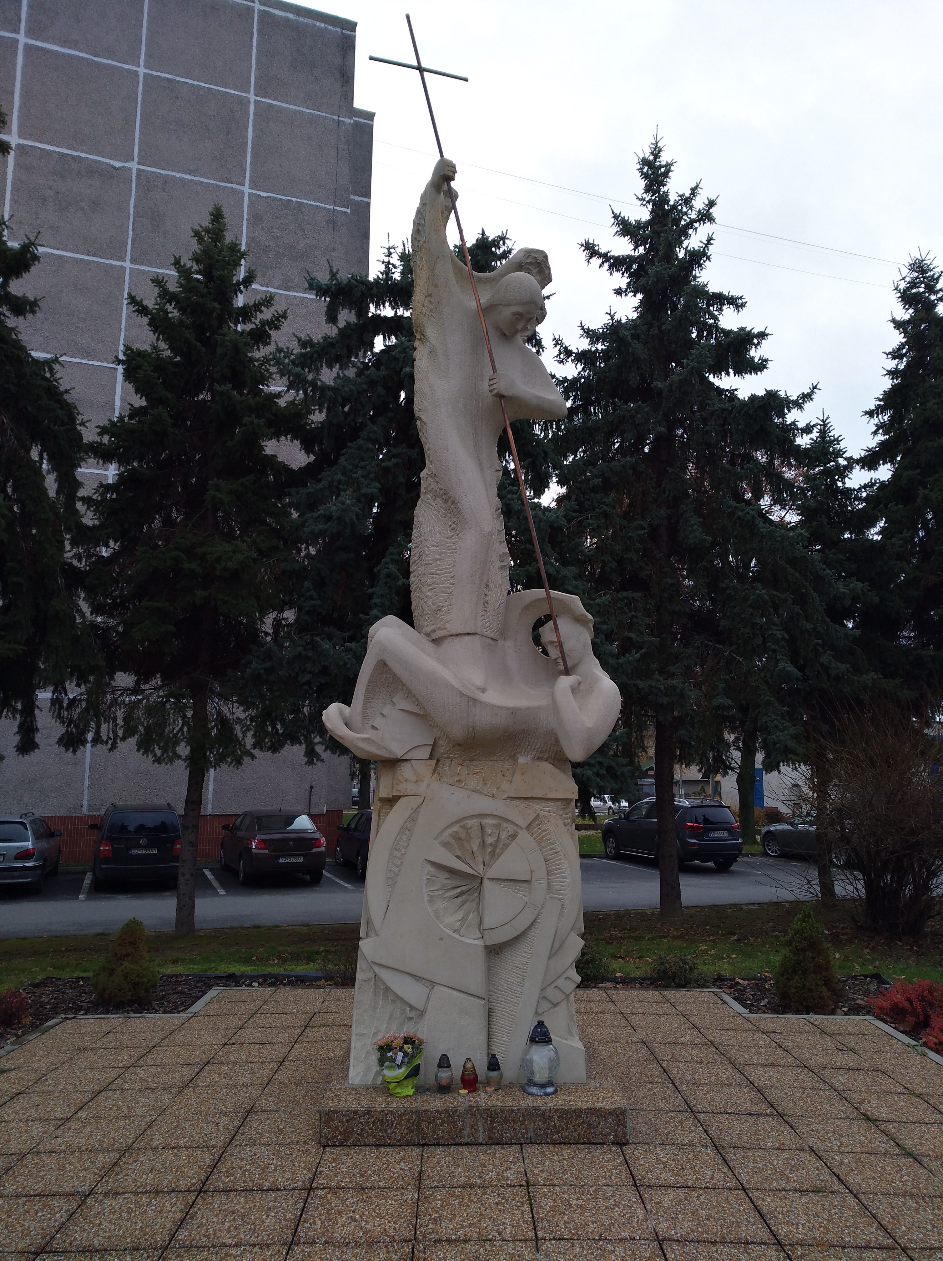 Socha sv. Archanjela Michala v Sobranciach od Petera Matla